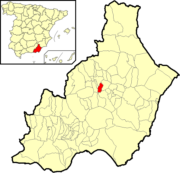 Situación del término municipal de Laroya respecto a la provincia de Almería, en España.